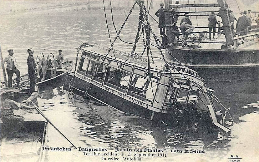 Paris - Un autobus Batignolles - Jardin des Plantes dans la Seine - Accident du 27 septembre 1911.